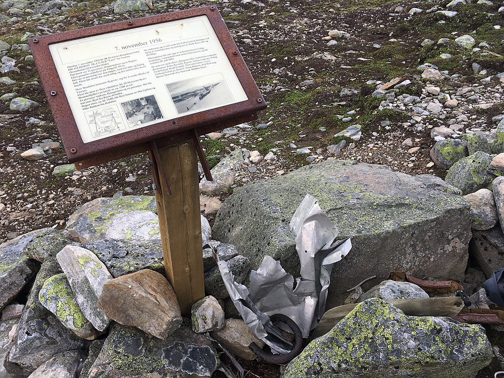 billede af stedet